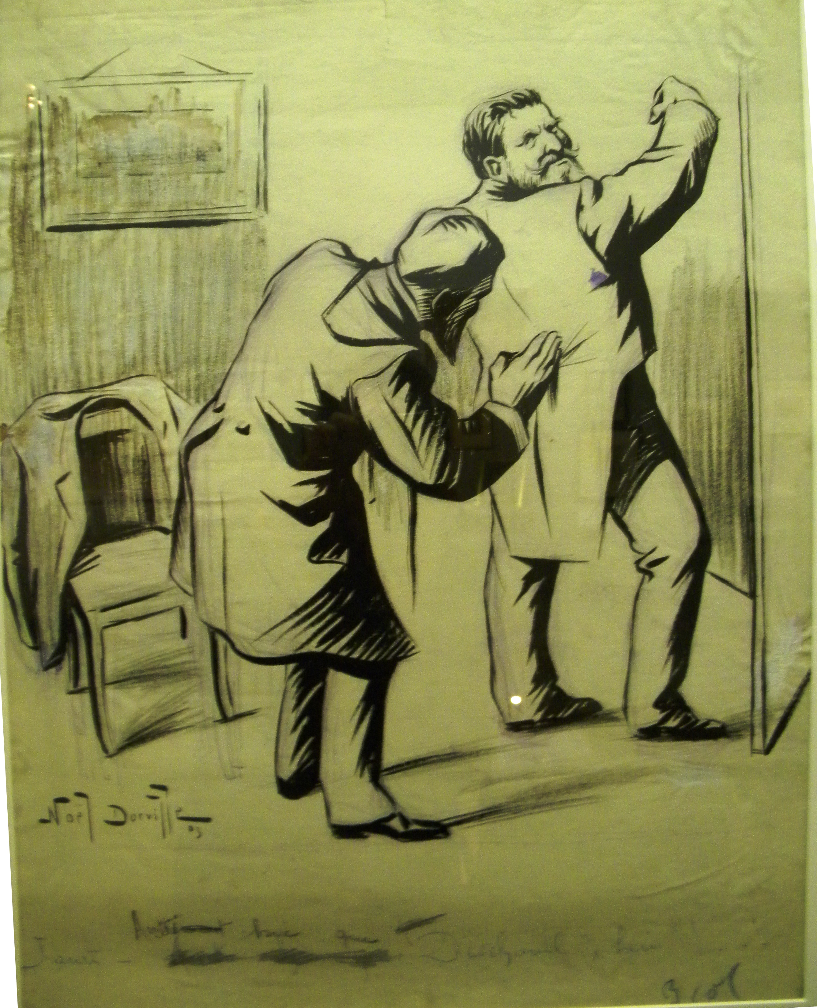 Noël Dorville Jean Jaures